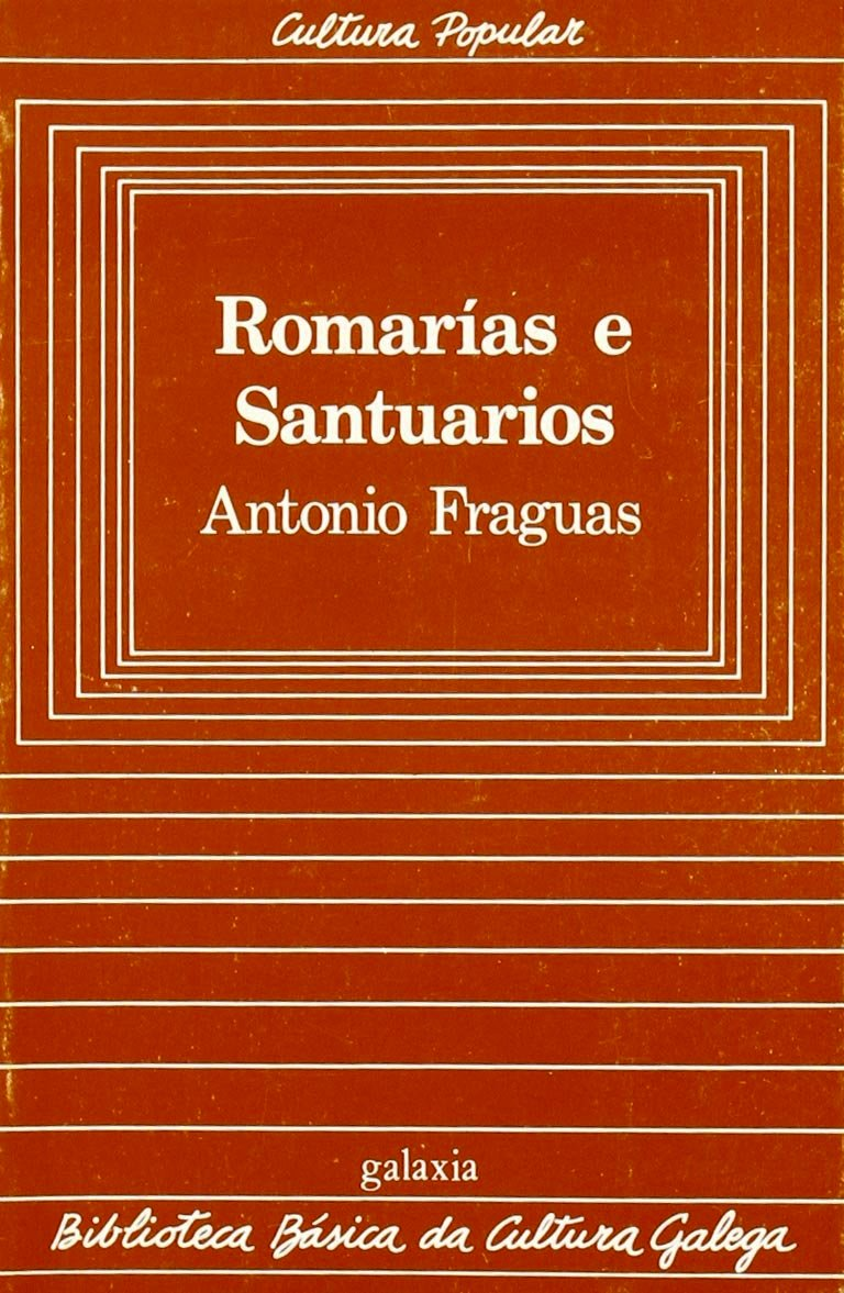 Biblioteca Básica da Cultura Galega, 20, Romarías e Santuarios, Antonio Fraguas.jpg